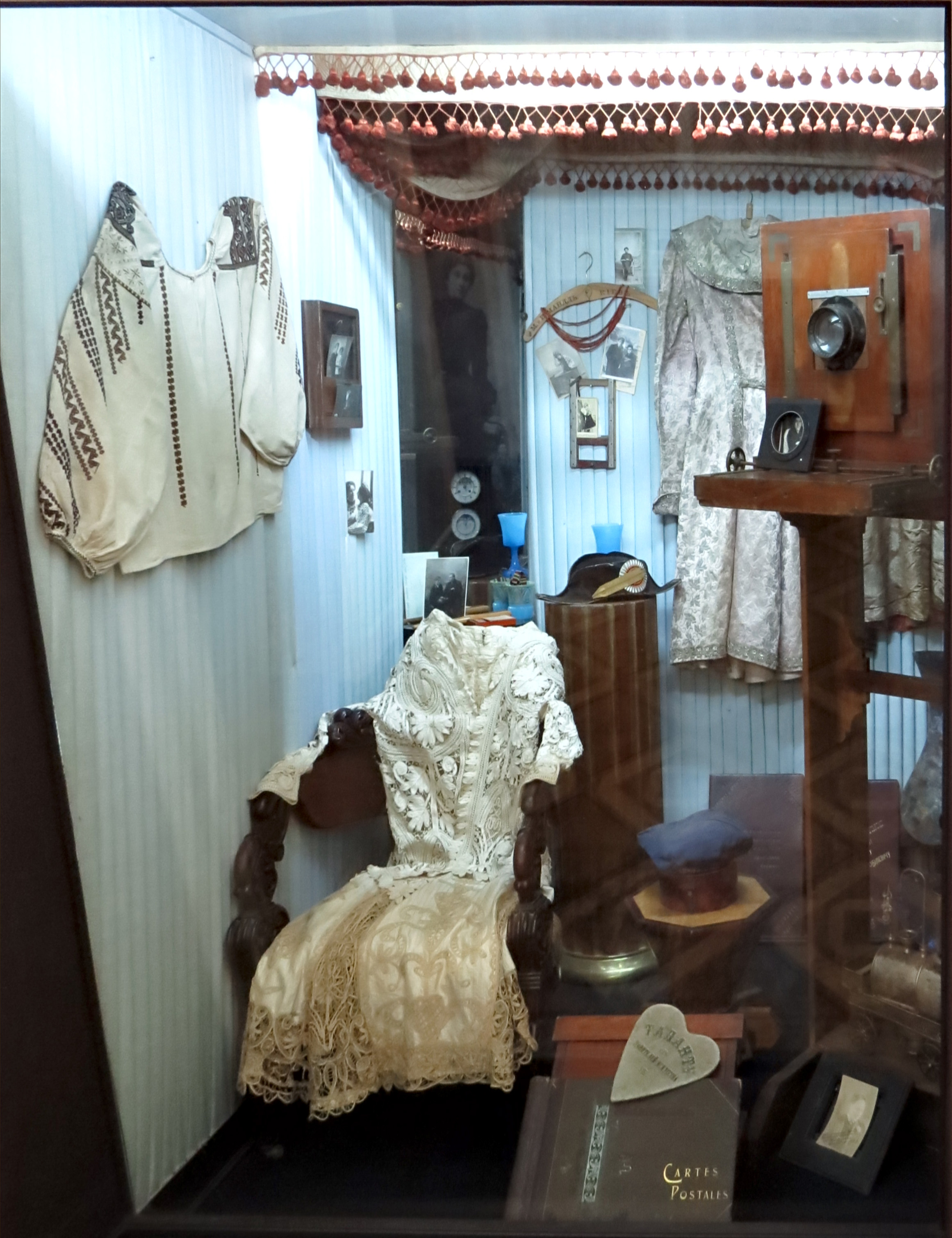 Київський музей театрального, музичного та кіномистецтва України. Експозиція, присвячена М. К. Заньковецькій